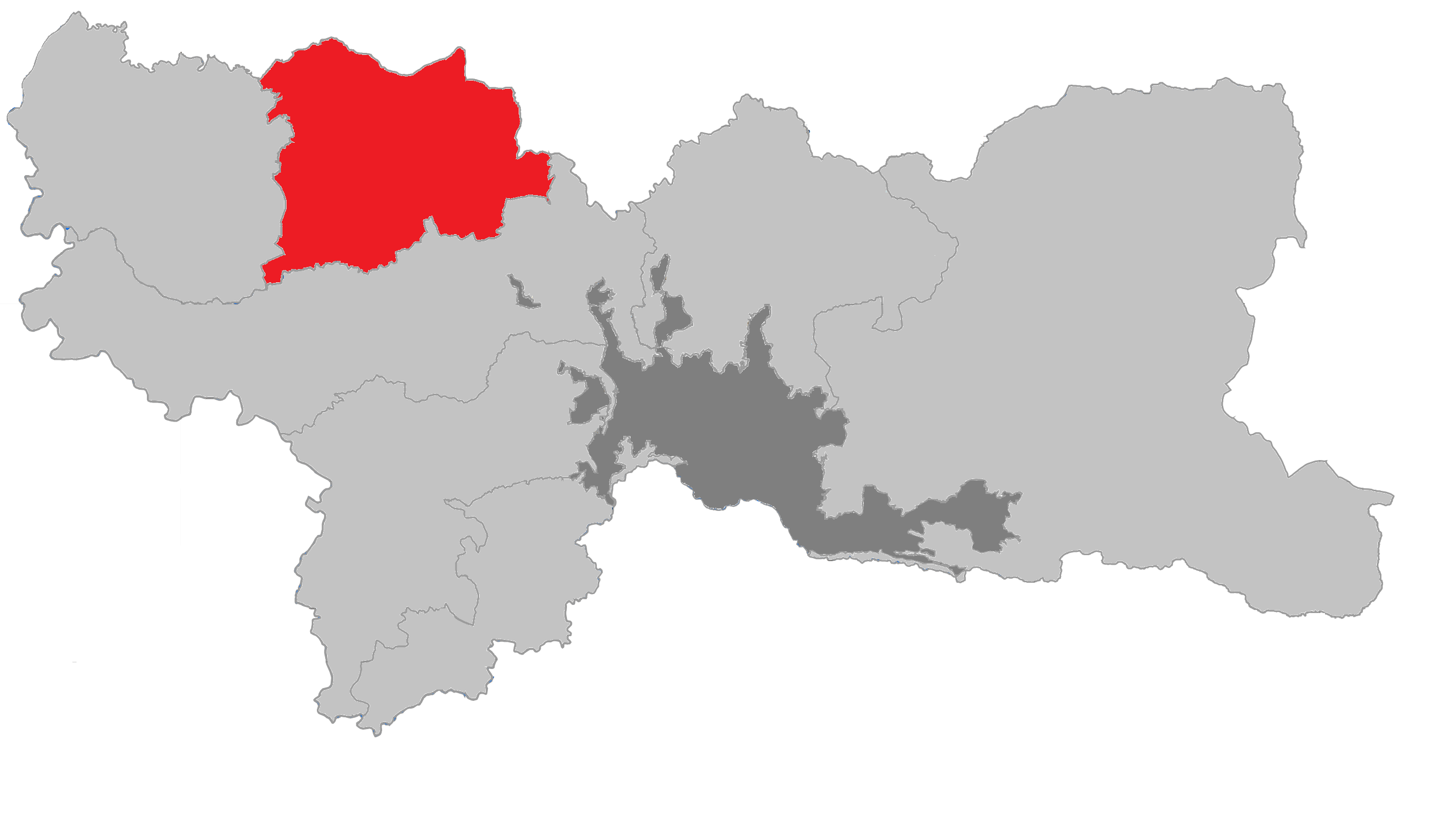 corregimiento de manizales